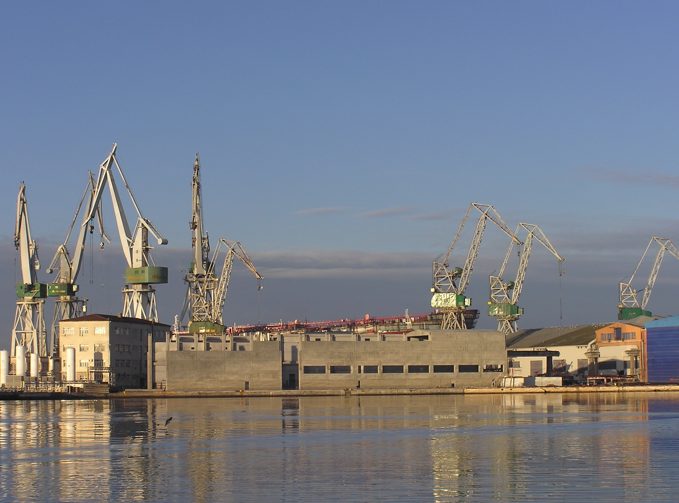 Uljanik shipyard in Pula, Croatia